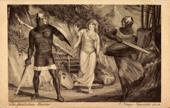 Die feindlichen Brüder. Nach dem Gemälde von E. Krupa-Krupinski Liebenstein und Sterrenberg, zwei Burgen am Rhein, waren im Besitz von zwei Brüdern, die einander feindlich waren und sich wegen eines Mädchens zum Zweikampf forderten. (Aus: Wilhelm Ruland, Rheinisches Sagenbuch)